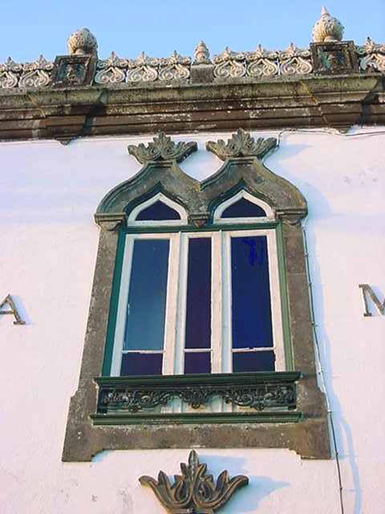 Villa Maria, Janela da Capela de Nossa Senhora das Vitórias, Angra do Heroísmo, ilha Terceira, Açores, Portugal.